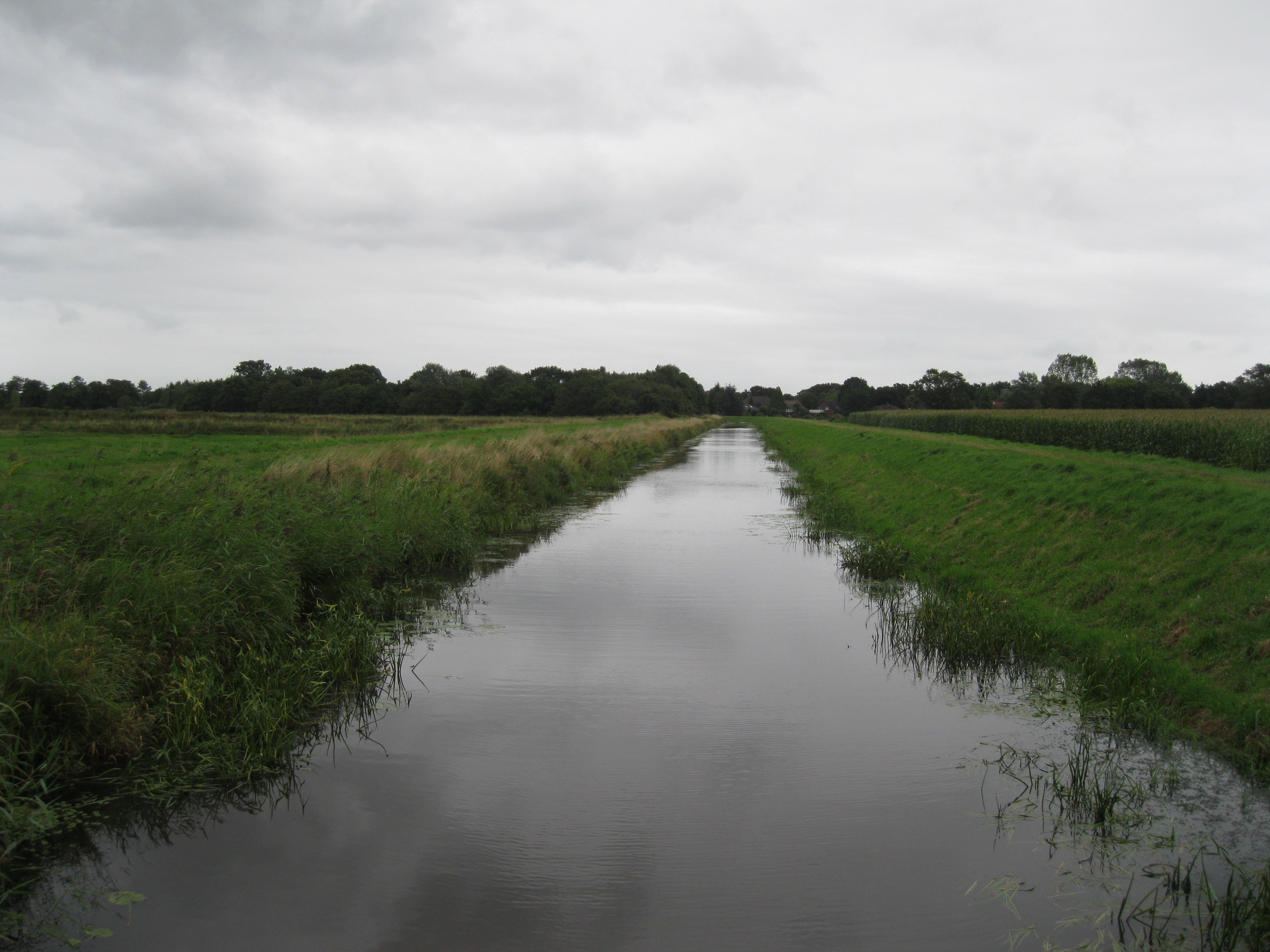 Sandhorster Ehe bei Extum Richtung Aurich